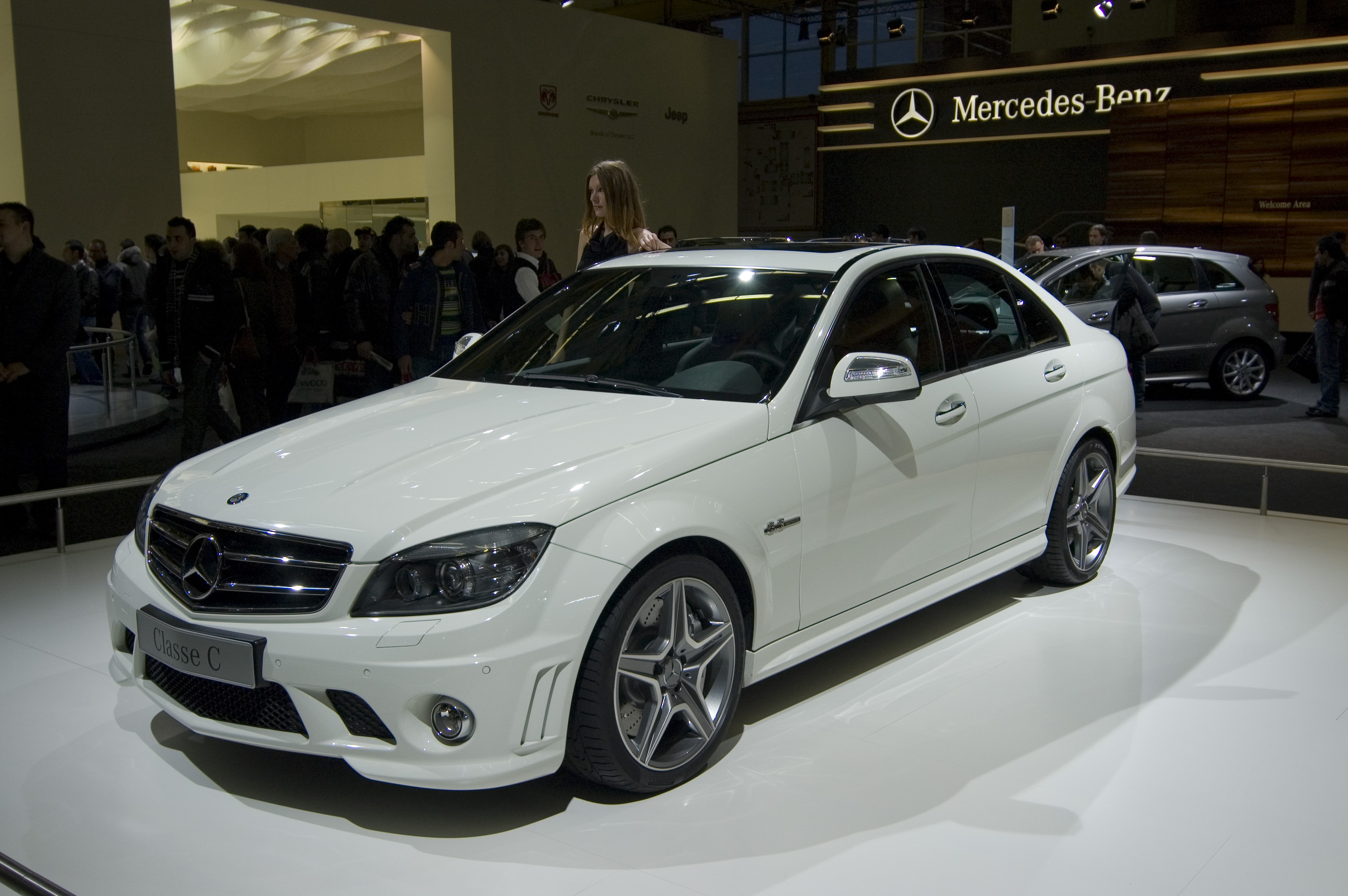 C 63 AMG